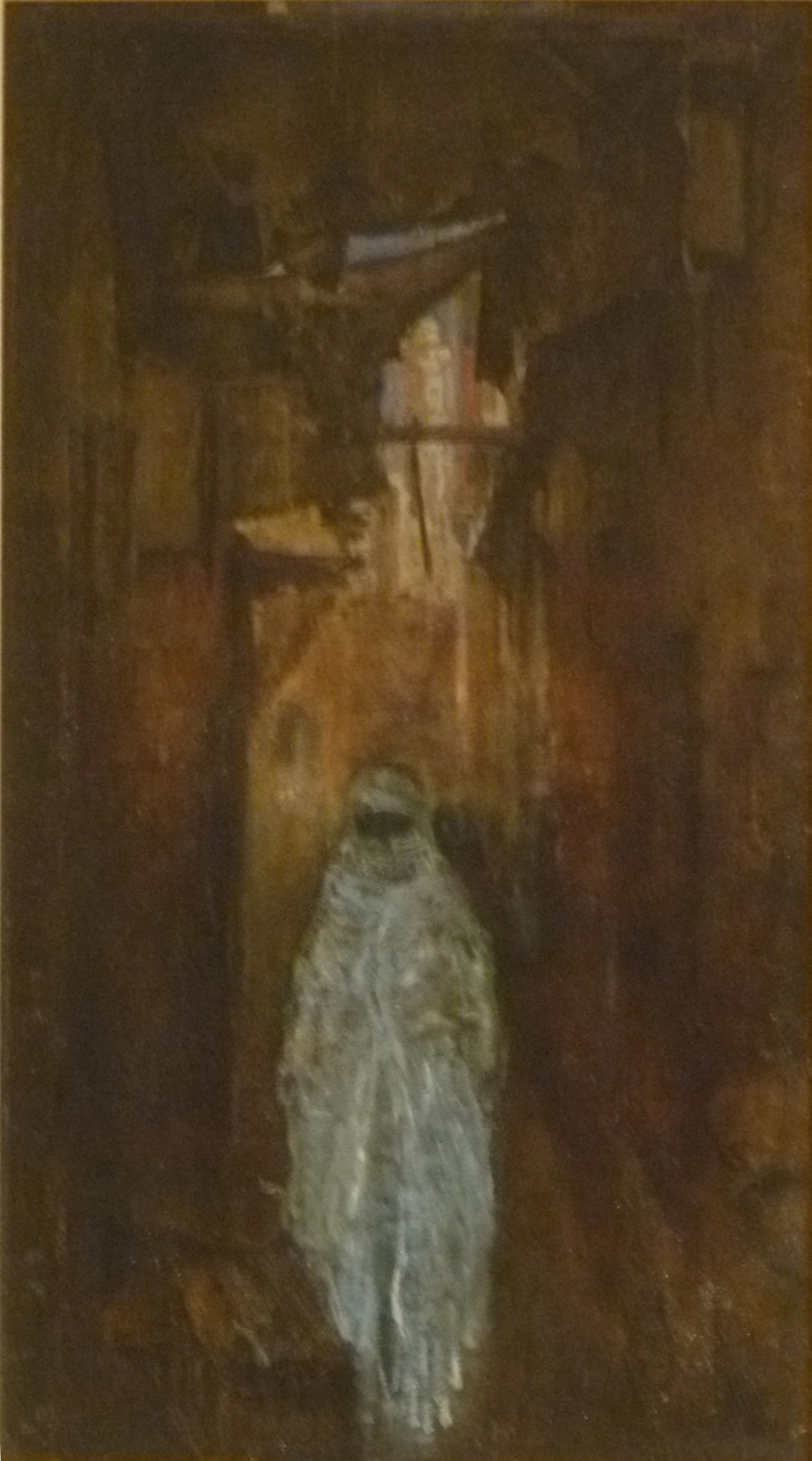 "Geanimeerd straatje in Tunis", olieverf op paneel (55 x 29 cm) door de Belgische kunstschilder Emile Verbrugge (1856-1936); privébezit